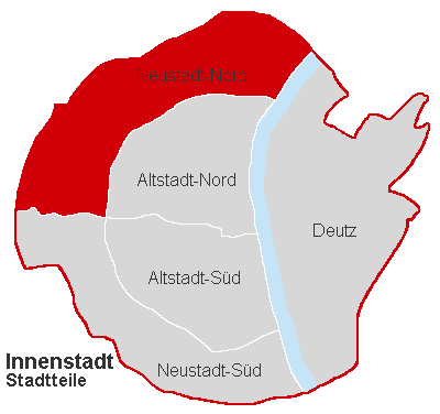 Lagekarte Neustadt-Nord im Stadtbezirk Köln-Innenstadt